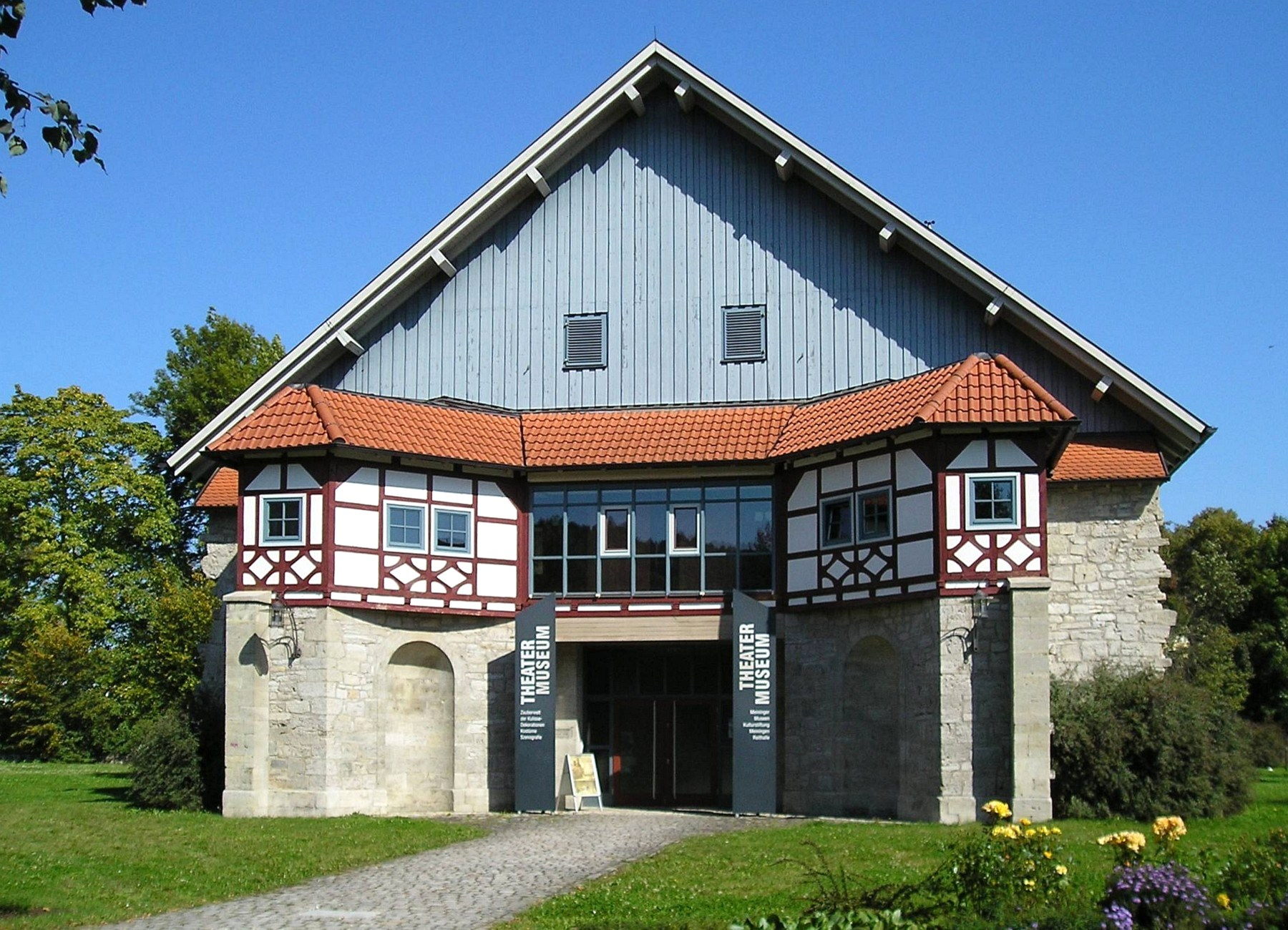 Das Theatermuseum in Meiningen, eröffnet 1999.